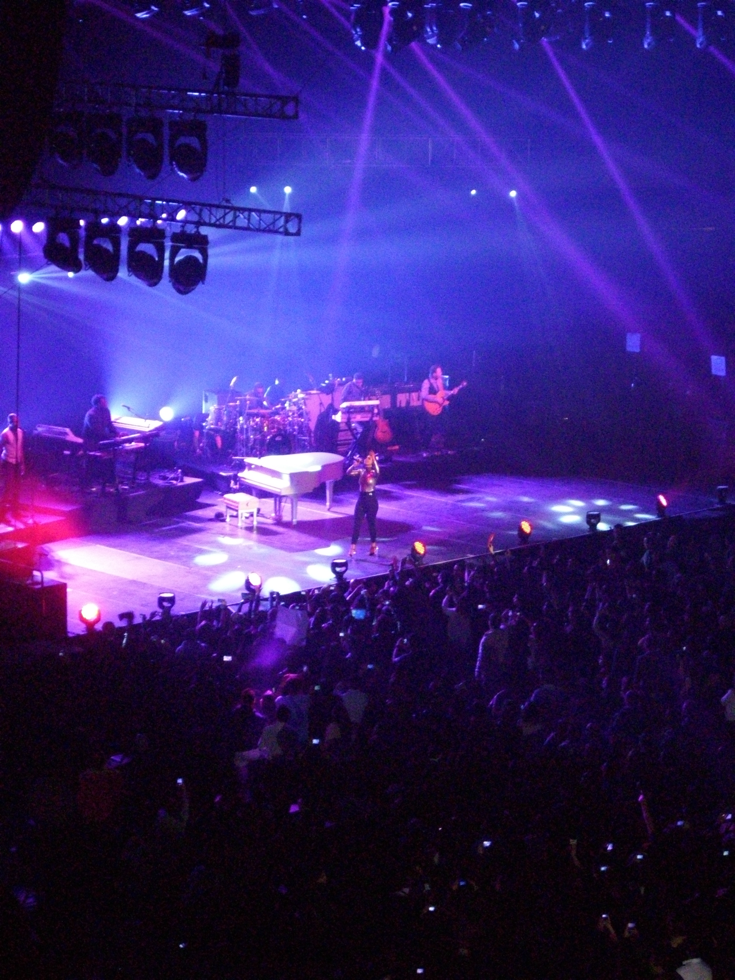 Alicia Keys cantando en el Movistar Arena. Santiago de Chile, 23 de septiembre de 2013.